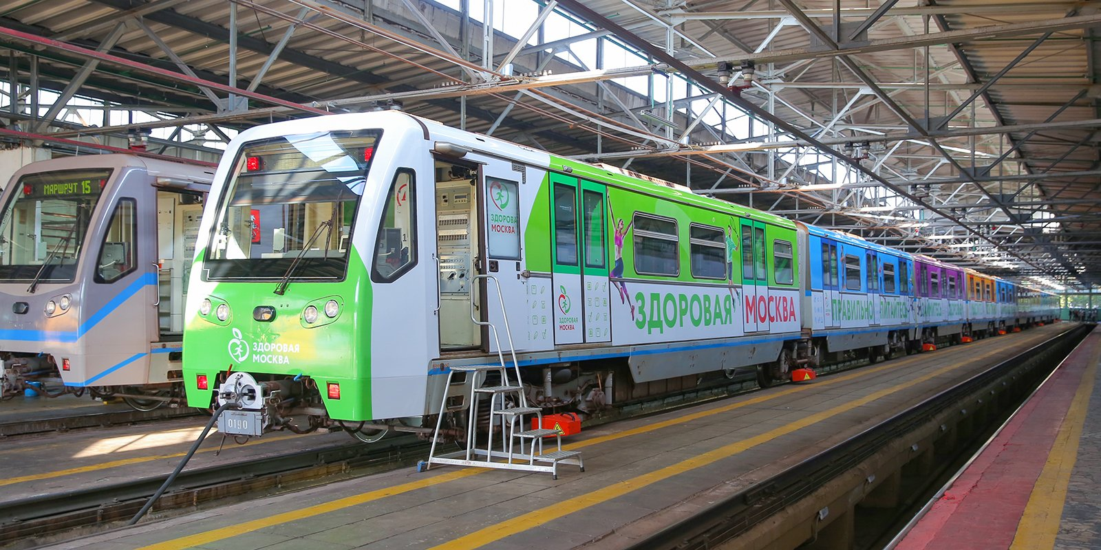 Поезд в депо